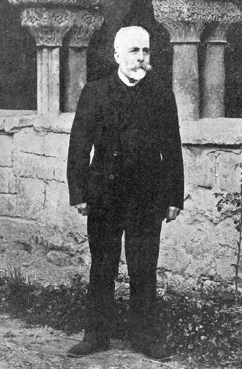 Jean-Baptiste Puget, grand organier toulousain, fils de Théodore Puget, en 1921 (cloître de Selòs, Espagne)